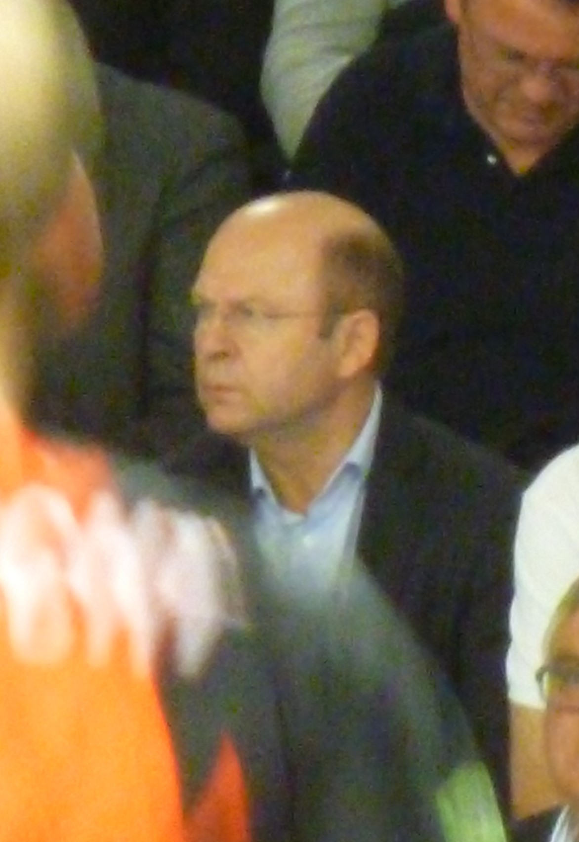 Jean-Pierre Gorge